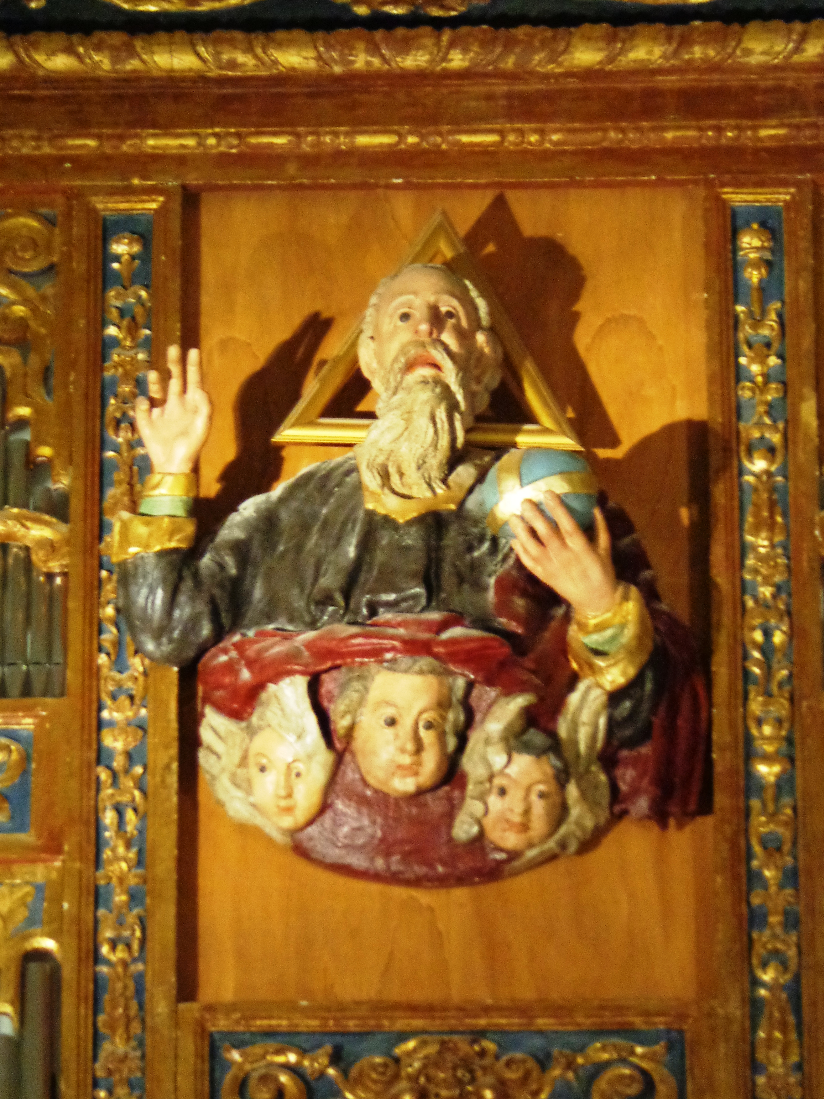 Dio Organo Duomo